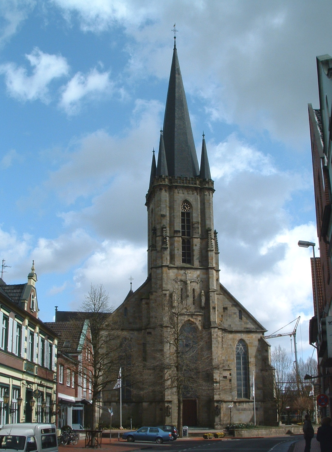 Sankt Agatha Kirche in Epe Westfalen